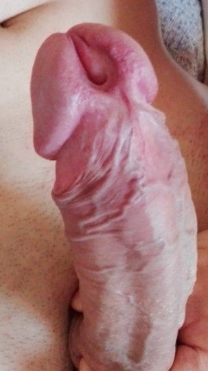 Glanduläre Hypospadie - Harnröhrenöffnung befindet sich im mittleren Bereich der Eichel